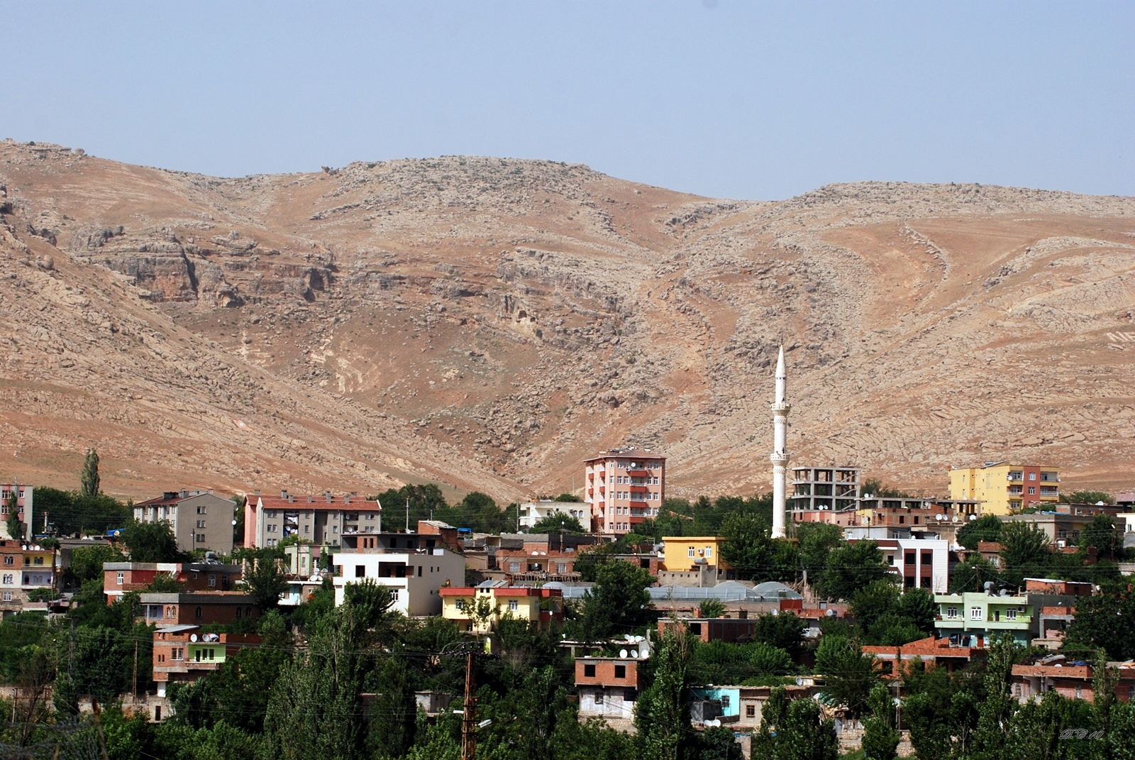 Kurdî: Di 23.06.2010 de ji aliyê min ve ji Dibistana Razane hatiye kişandin.